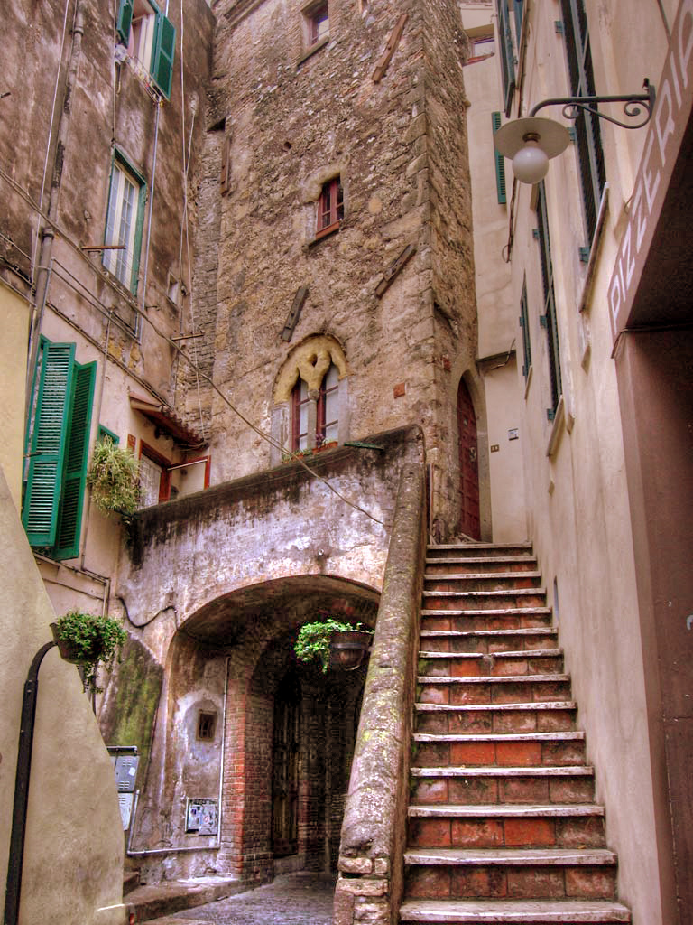 Nettuno, Lazio, Italia